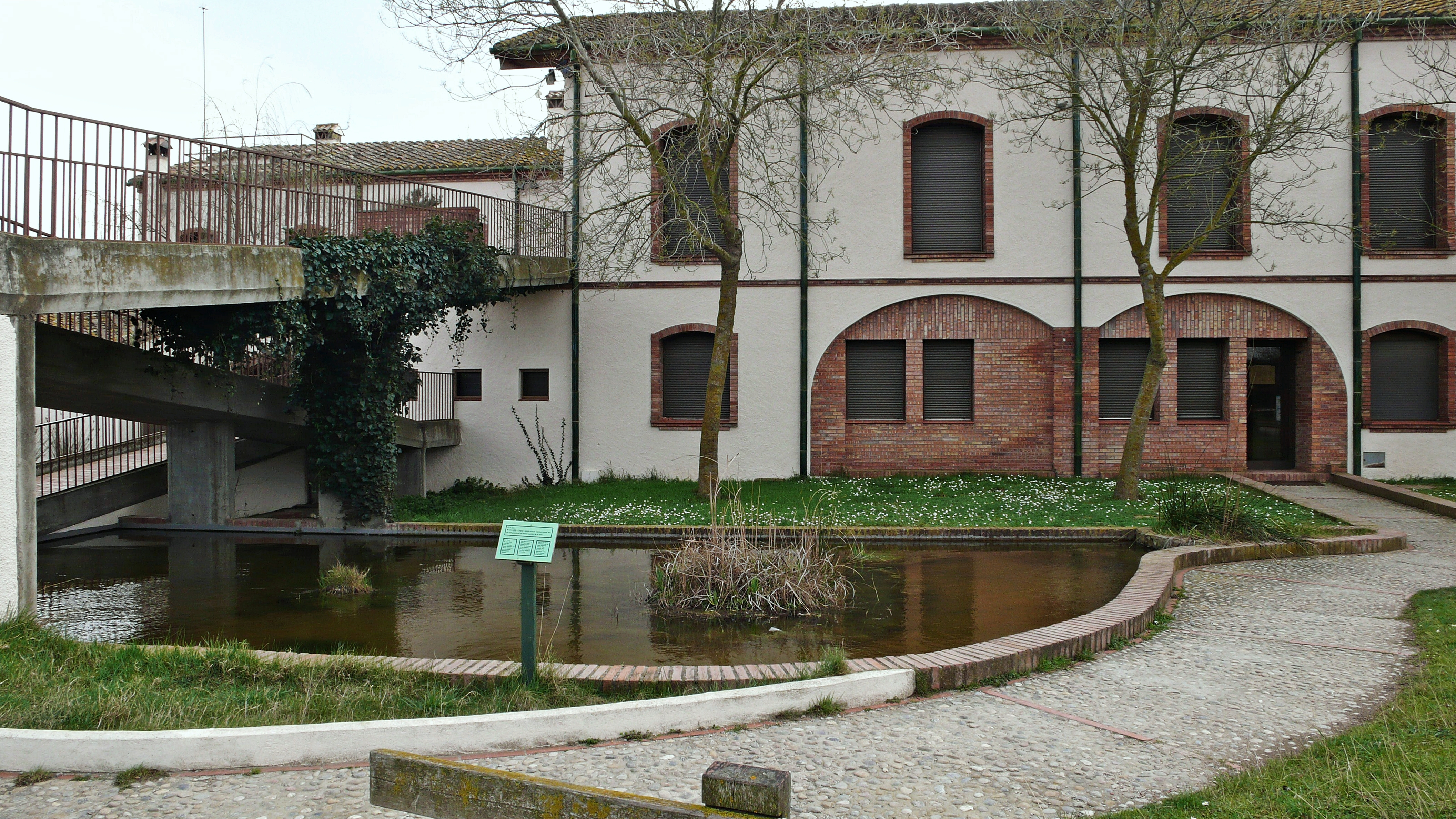 el cortalet-alt emporda-cataluña